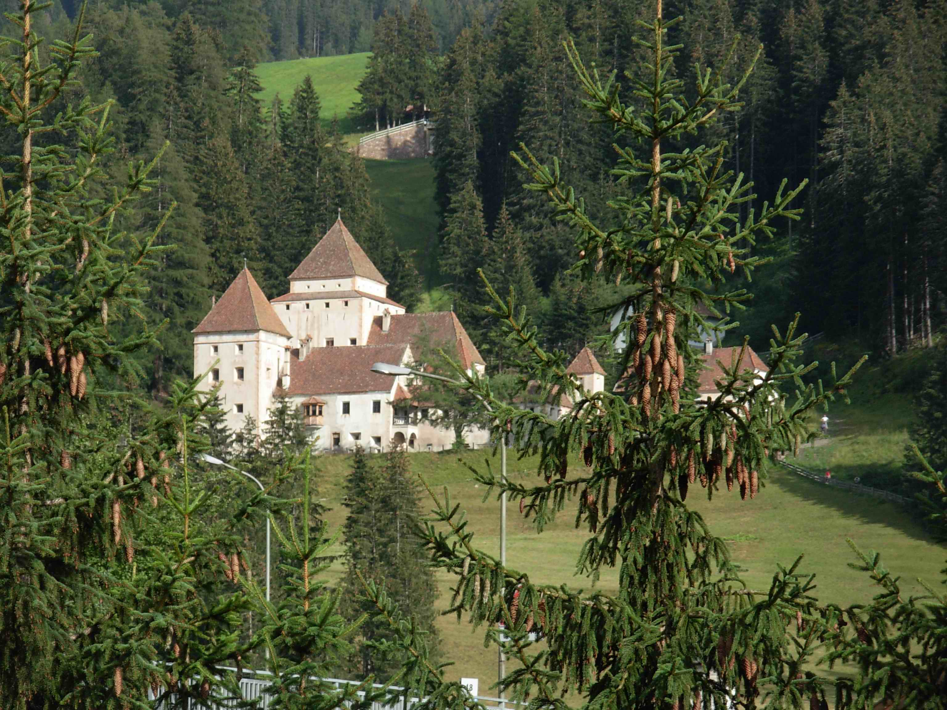 Die Fischburg in Gröden